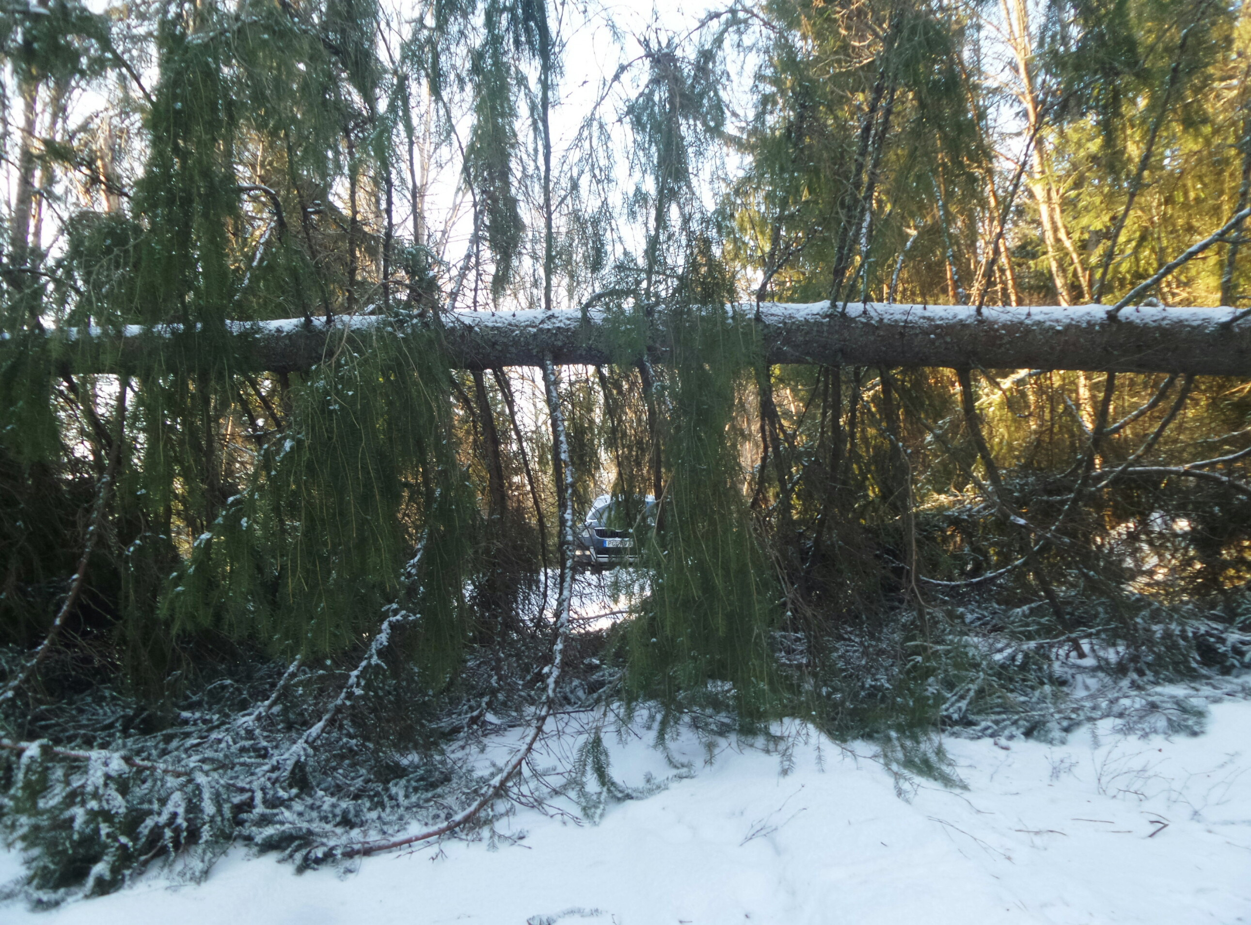 Spärrad skogsväg vid Pellemossen, Norrtälje efter stormen Alfrida